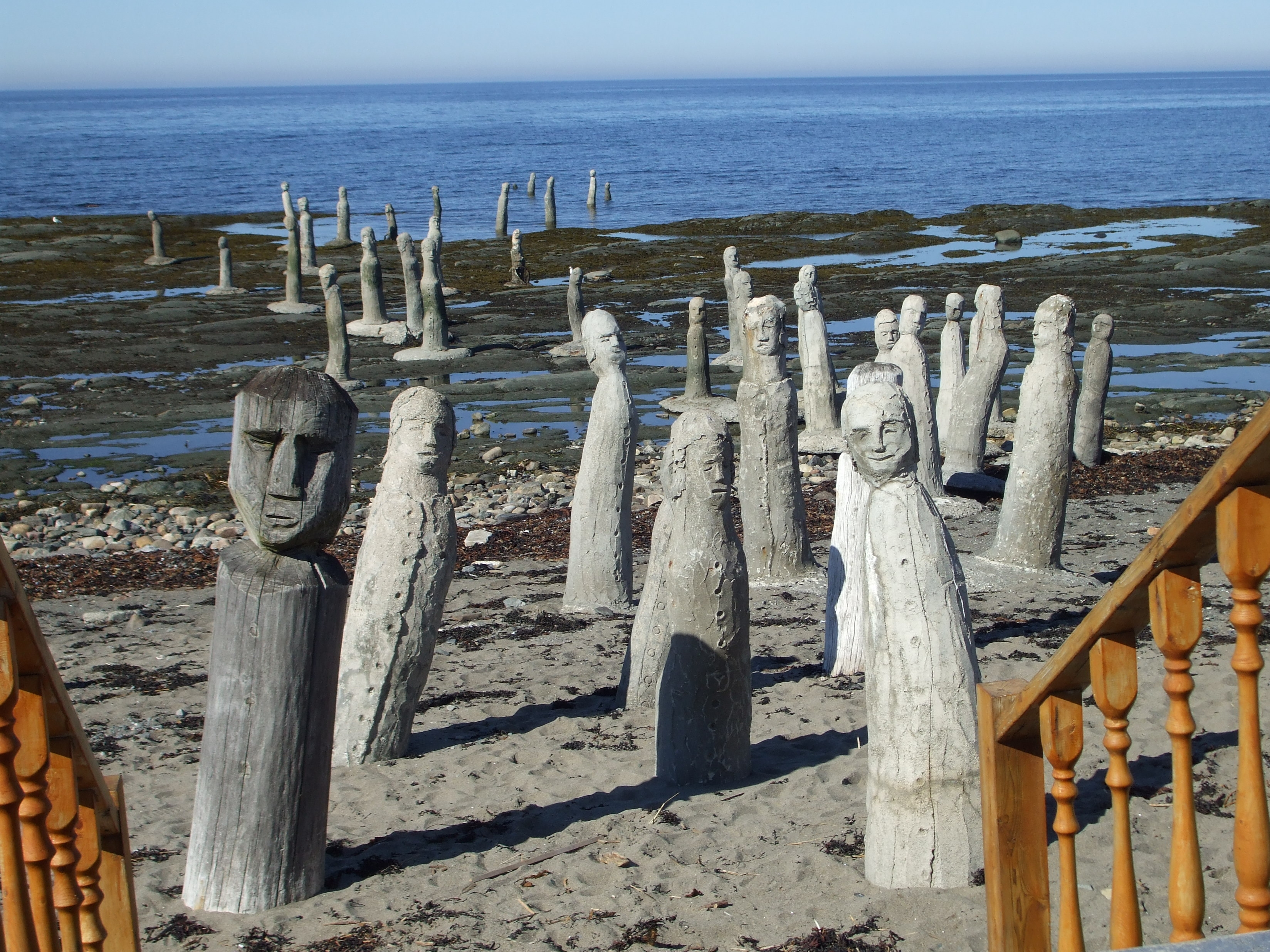 Le Grand Rassemblement est une création de plus de 80 sculptures pincipalement en béton de l'artiste Marcel Gagnon, exposées sur le littoral du fleuve Saint-Laurent à Sainte-Flavie, dans le Bas Saint-Laurent au Québec.